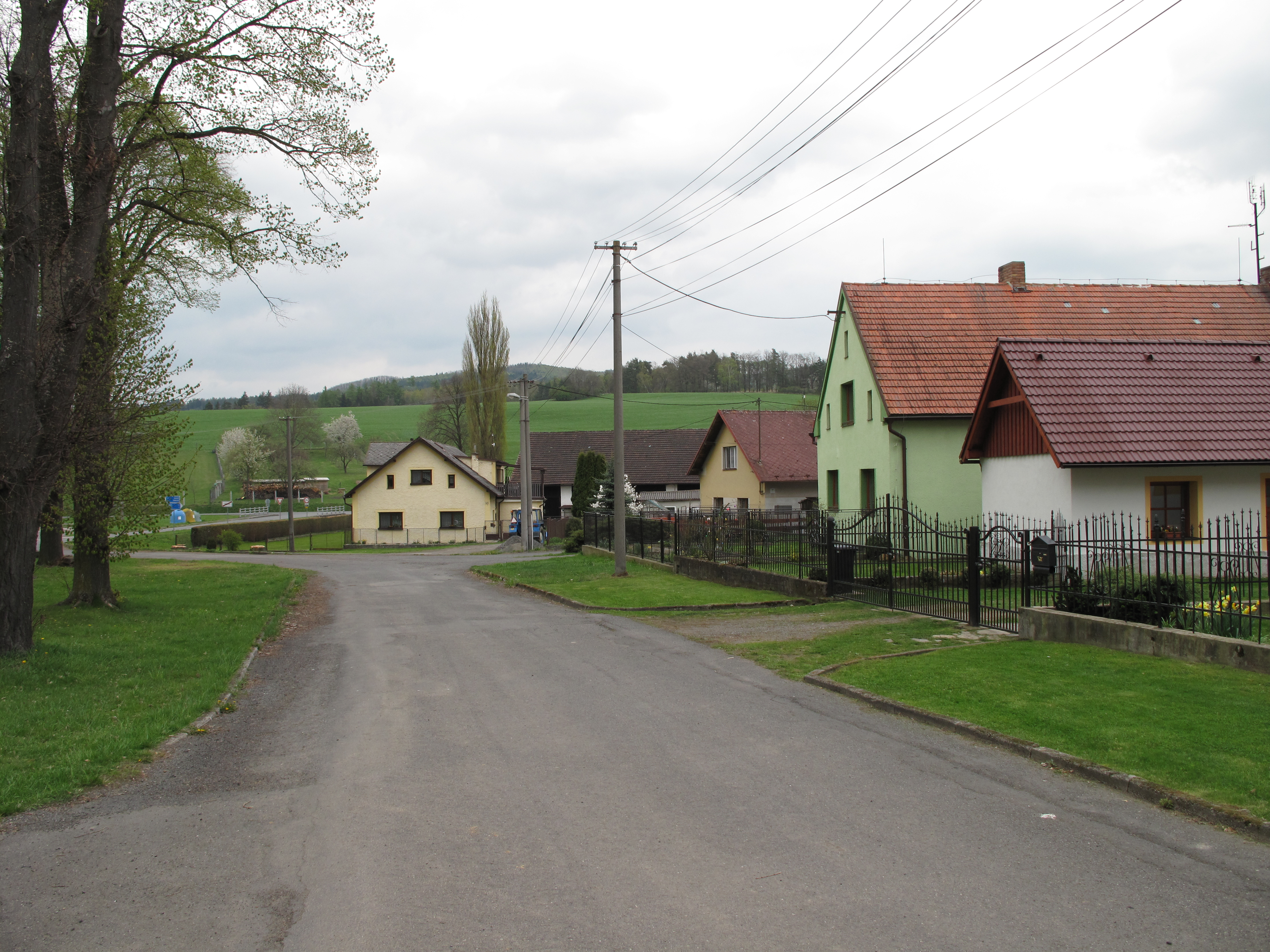 Vílov. Okres Klatovy, Česká republika.